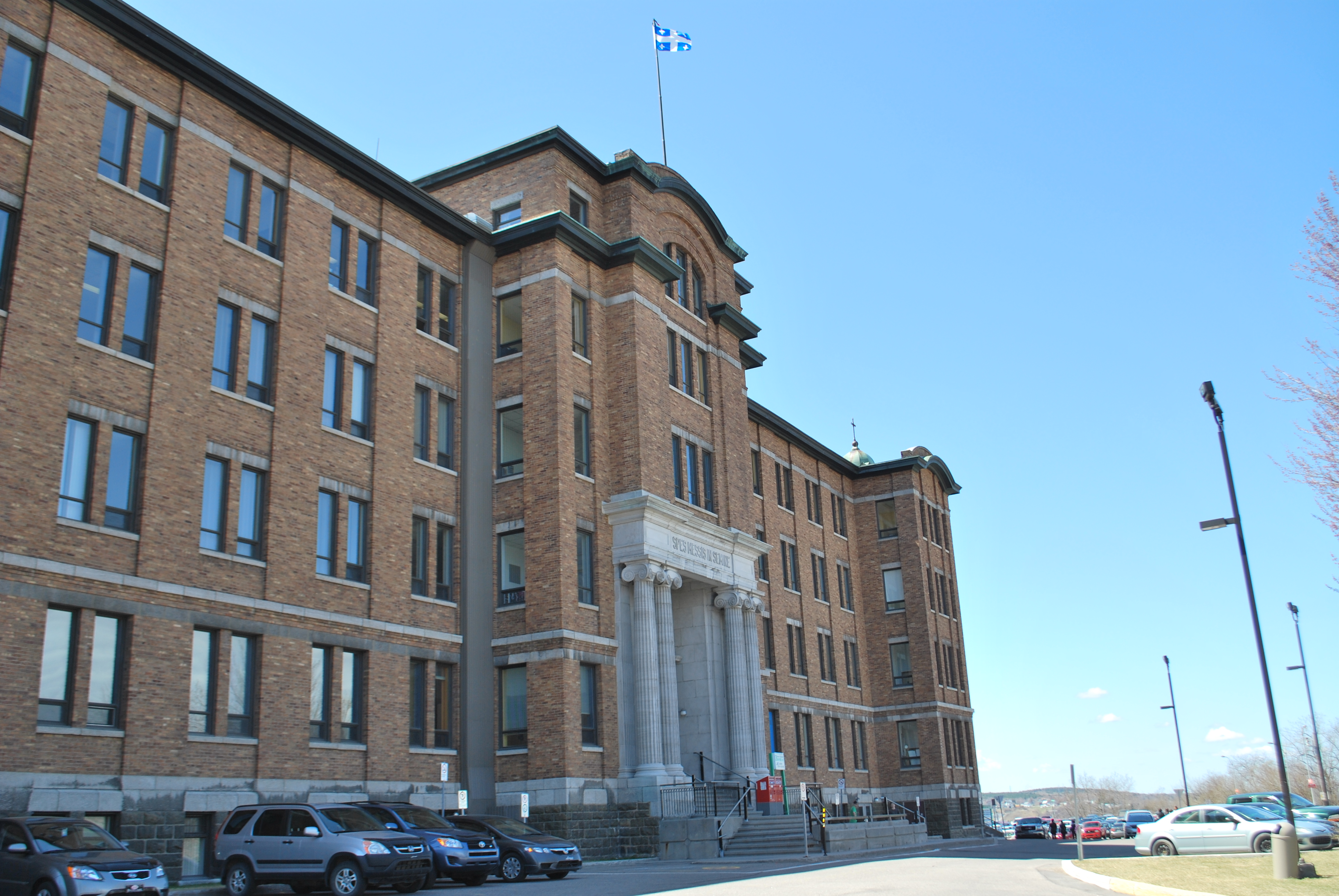 Cégep de Chicoutimi. Aile F vue vers le sud-ouest